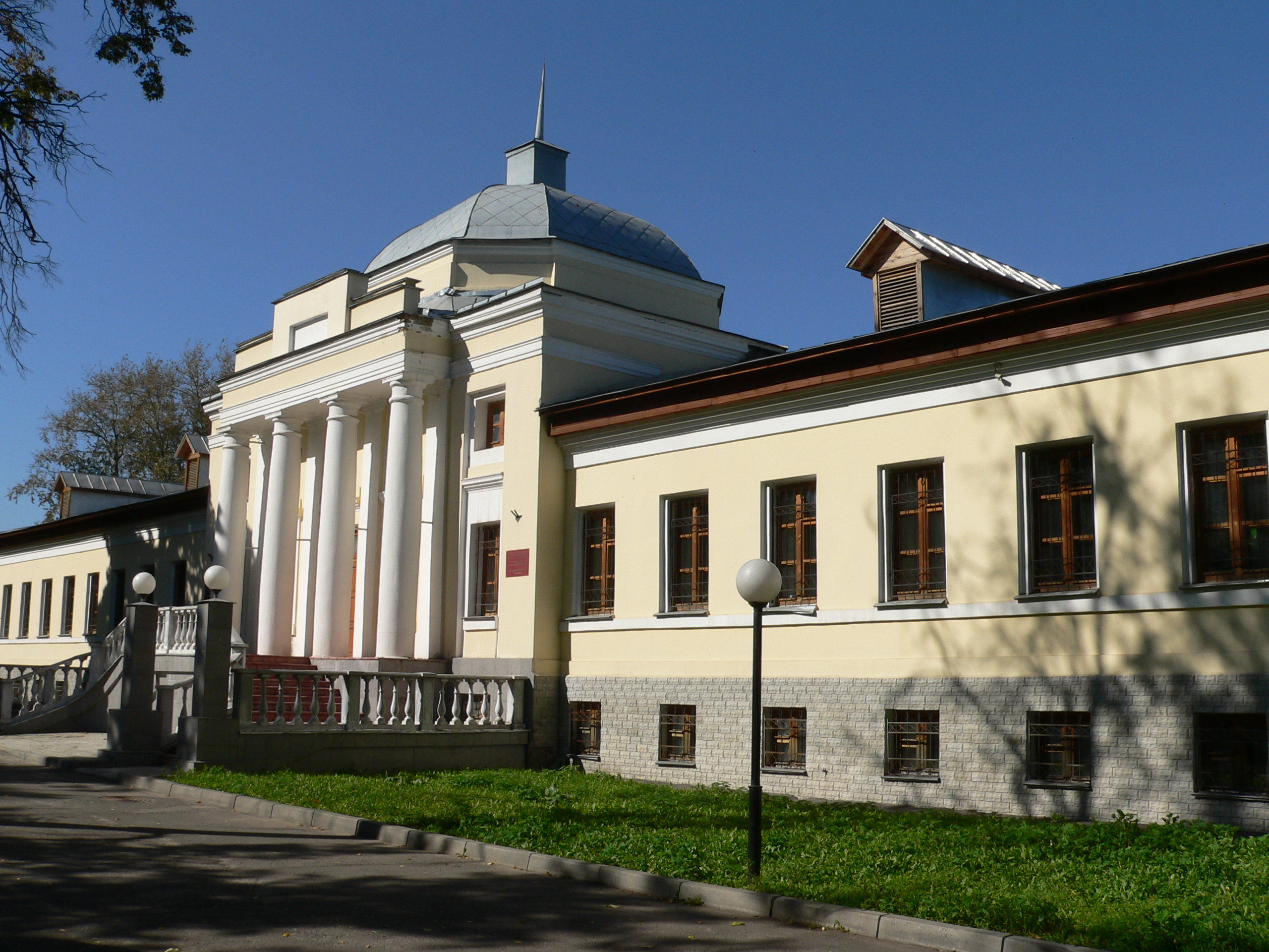 Первая губернская больница во Владимире